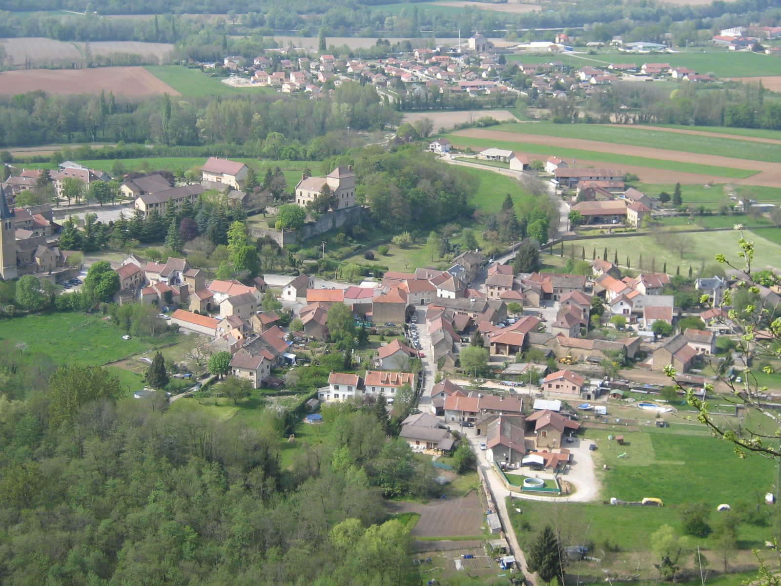 Hières-sur-Amby vue depuis le site de Larina.